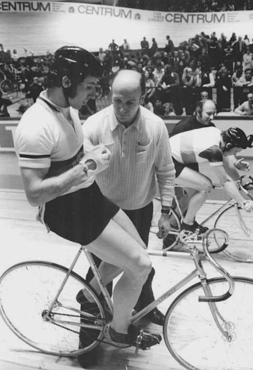 Jürgen Geschke, Peter Eichstaedt ADN-ZB Franke 5.1.75 Berlin: Am Fünften Renntag der 23. Winterbahn-Saison in der Werner-Seelenbinder-Halle wiederholte Jürgen Geschke (vorn) vom TSC Berlin sienen Sprinterfolg vom Vortage. Sein Endlaufgegener war sein Klubkamerad Peter Eichstaadt. (hinten)